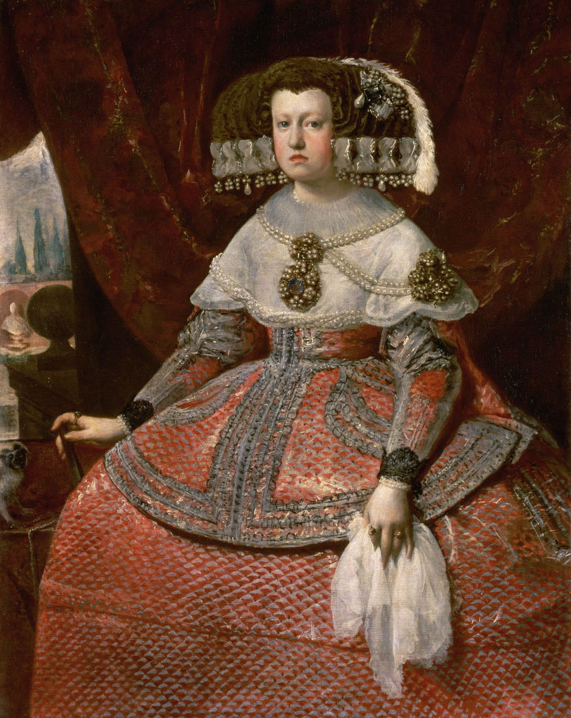 Abgebildete Person: Königin Maria Anna Tochter d. Ferdinand III. von Habsburg Österreich